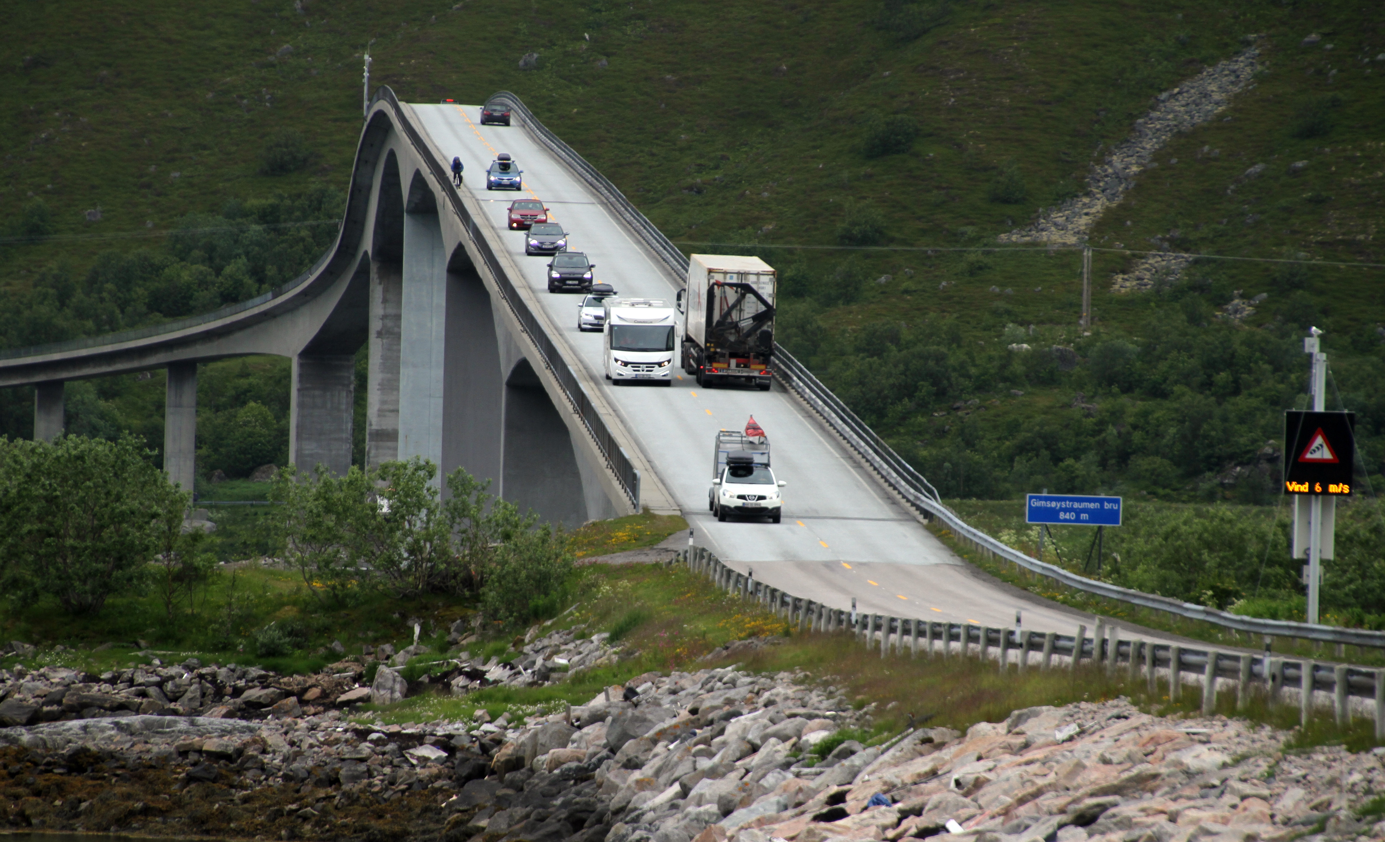 Gimsøystraumen-Bruecke zwischen Austvågøy und Gimsøy (Lofoten, Norwegen)